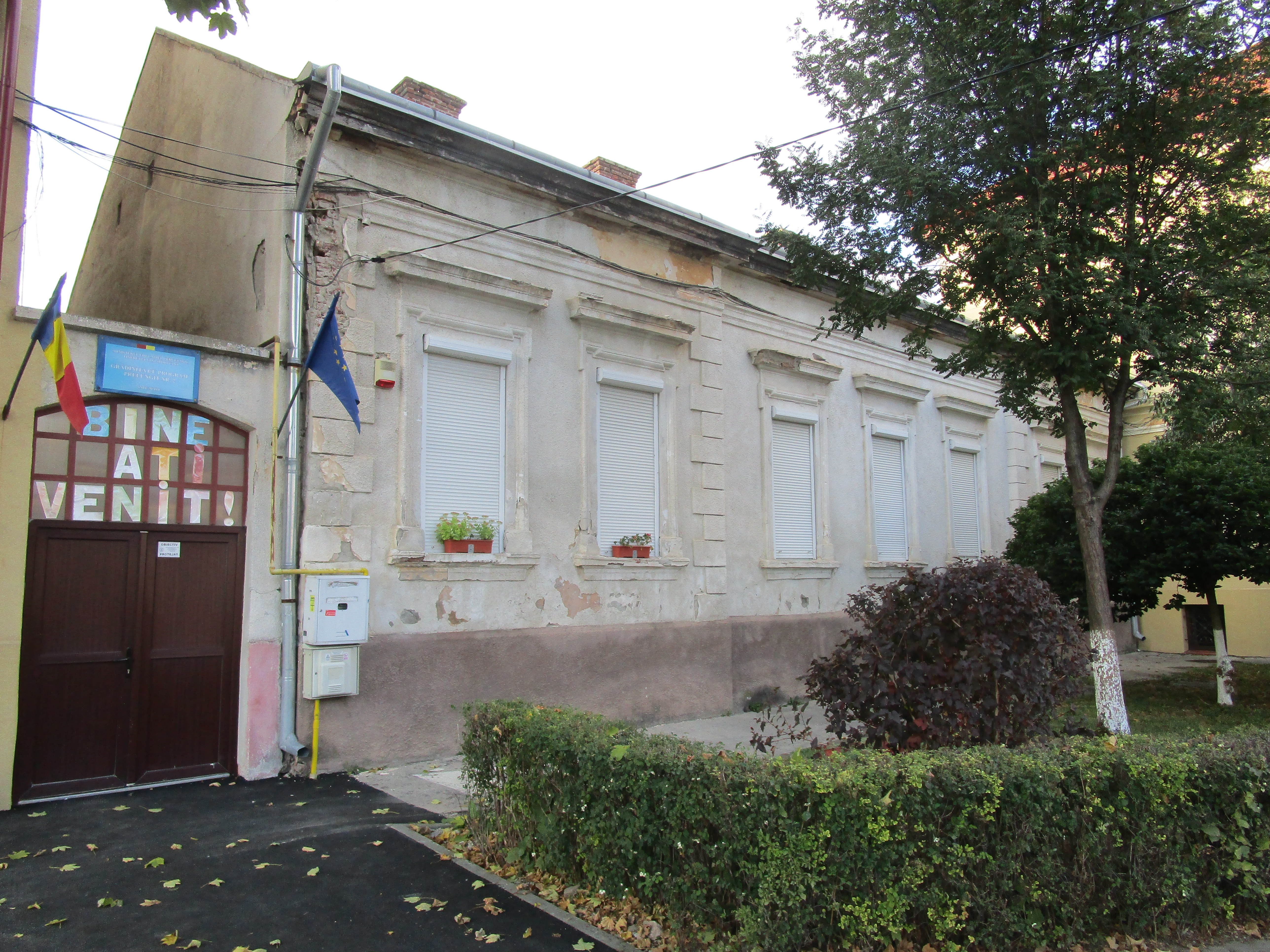 Casă de locuit